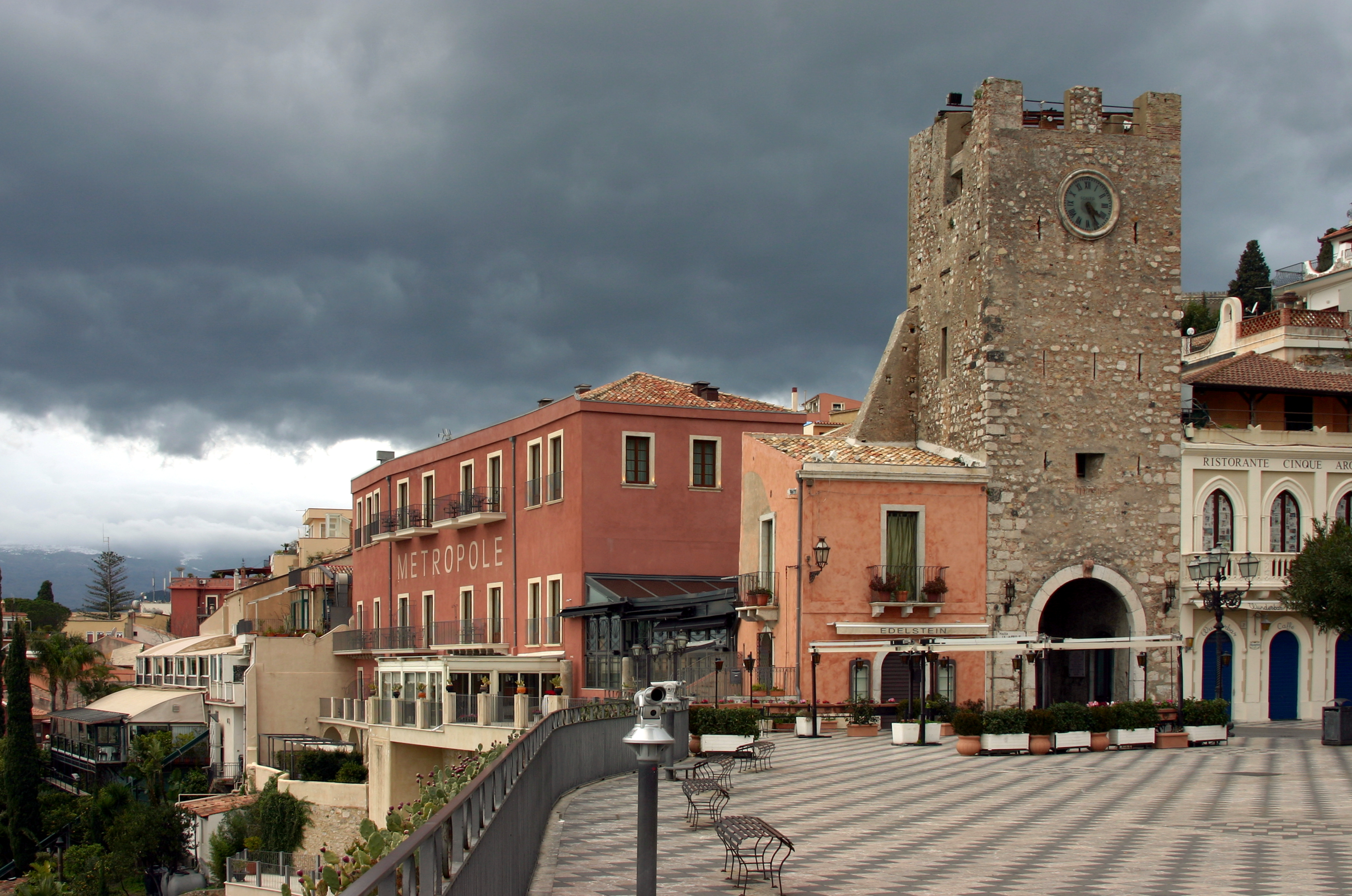 Taormina